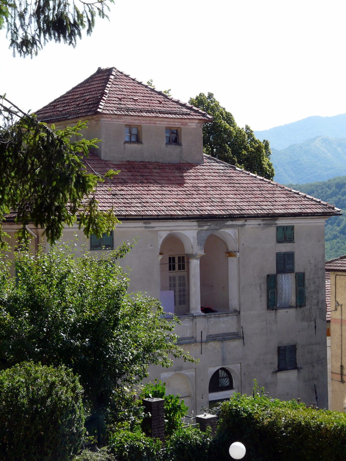 Palazzo dei Fieschi, di proprietà privata, Crocefieschi, Liguria, Italia